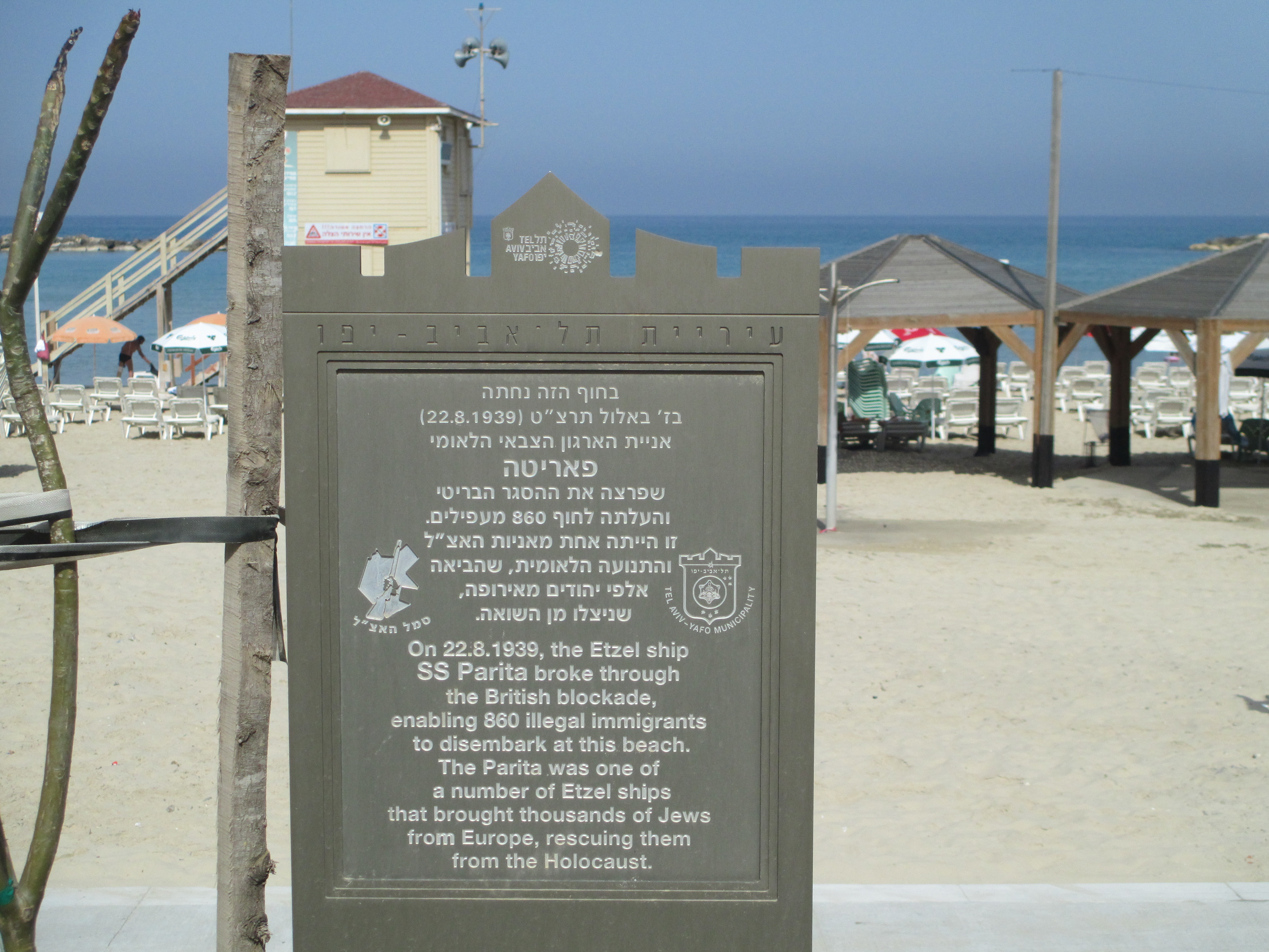 לוחית זיכרון לספינת המעפילים "פאריטה" בחוף תל אביב מול מלון דן